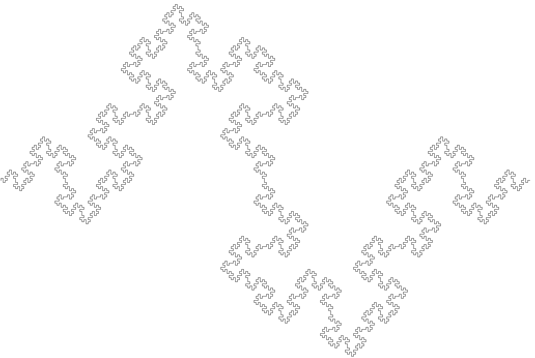 Quadratic Koch fractal.